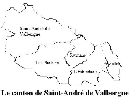 Le canton de Saint-André de Valborgne